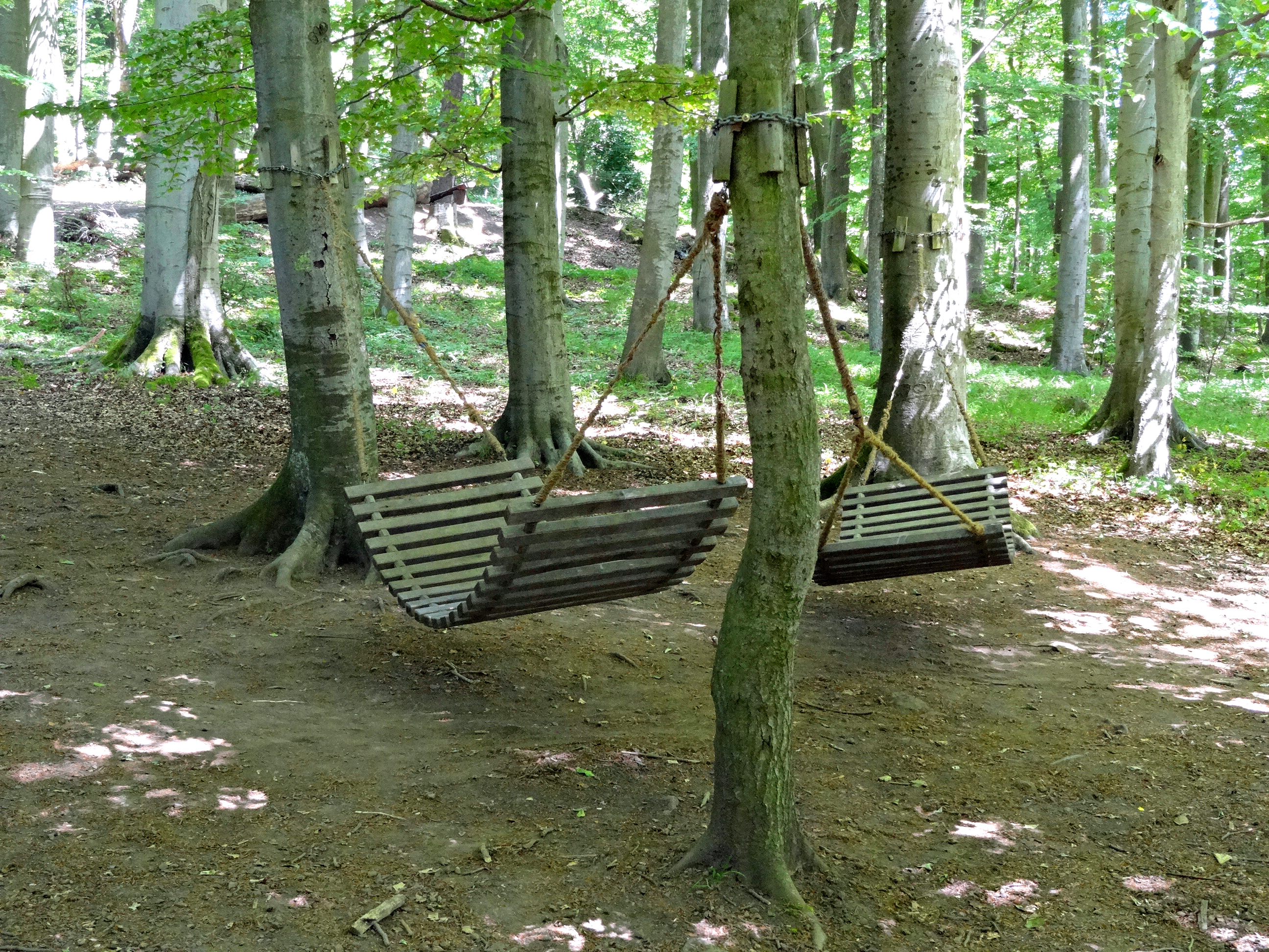 Grünes Meer